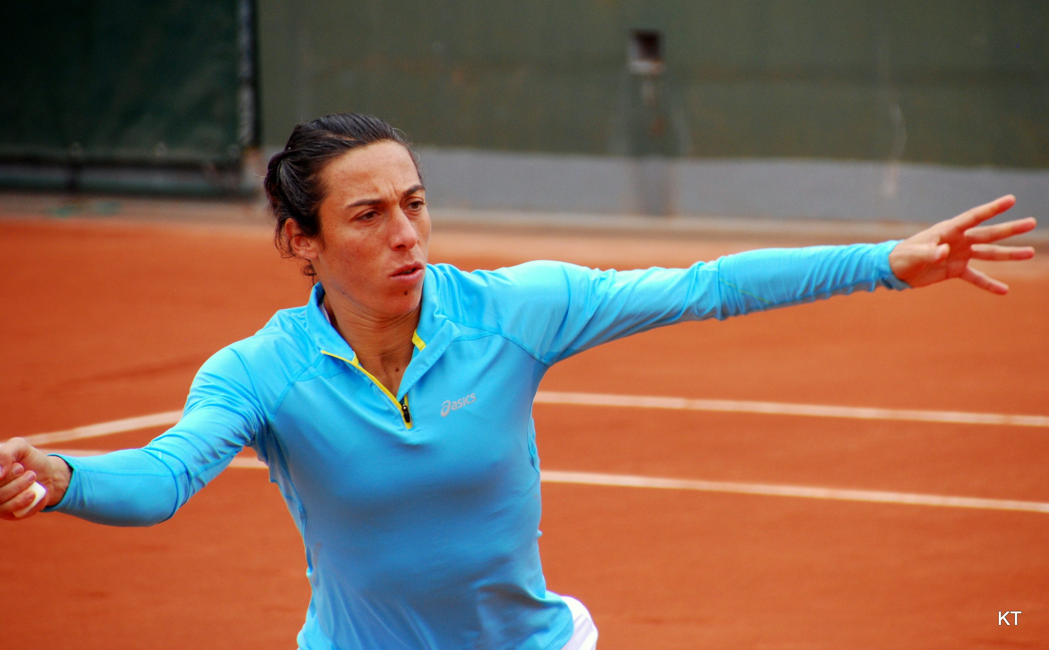 Francesca Schiavone